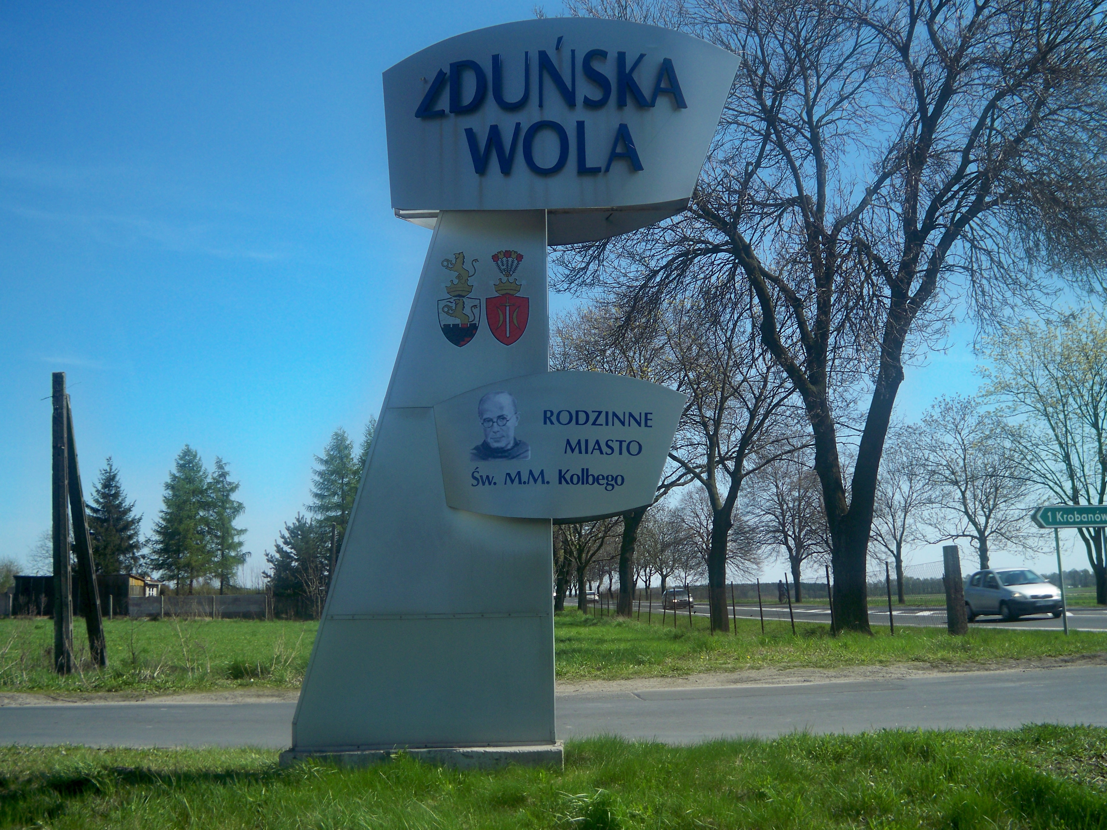 Witacz na drodze krajowej nr 12,14